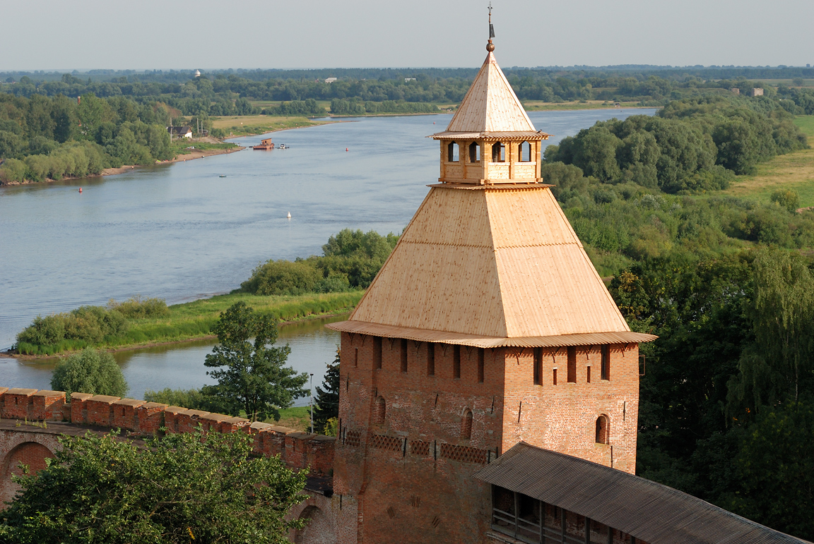 Pohled z vyhlídky na Velikonovgorodské pevnosti. V popředí je věž na opevnění, v pozadí pak řeka rozlévající se dále do krajiny